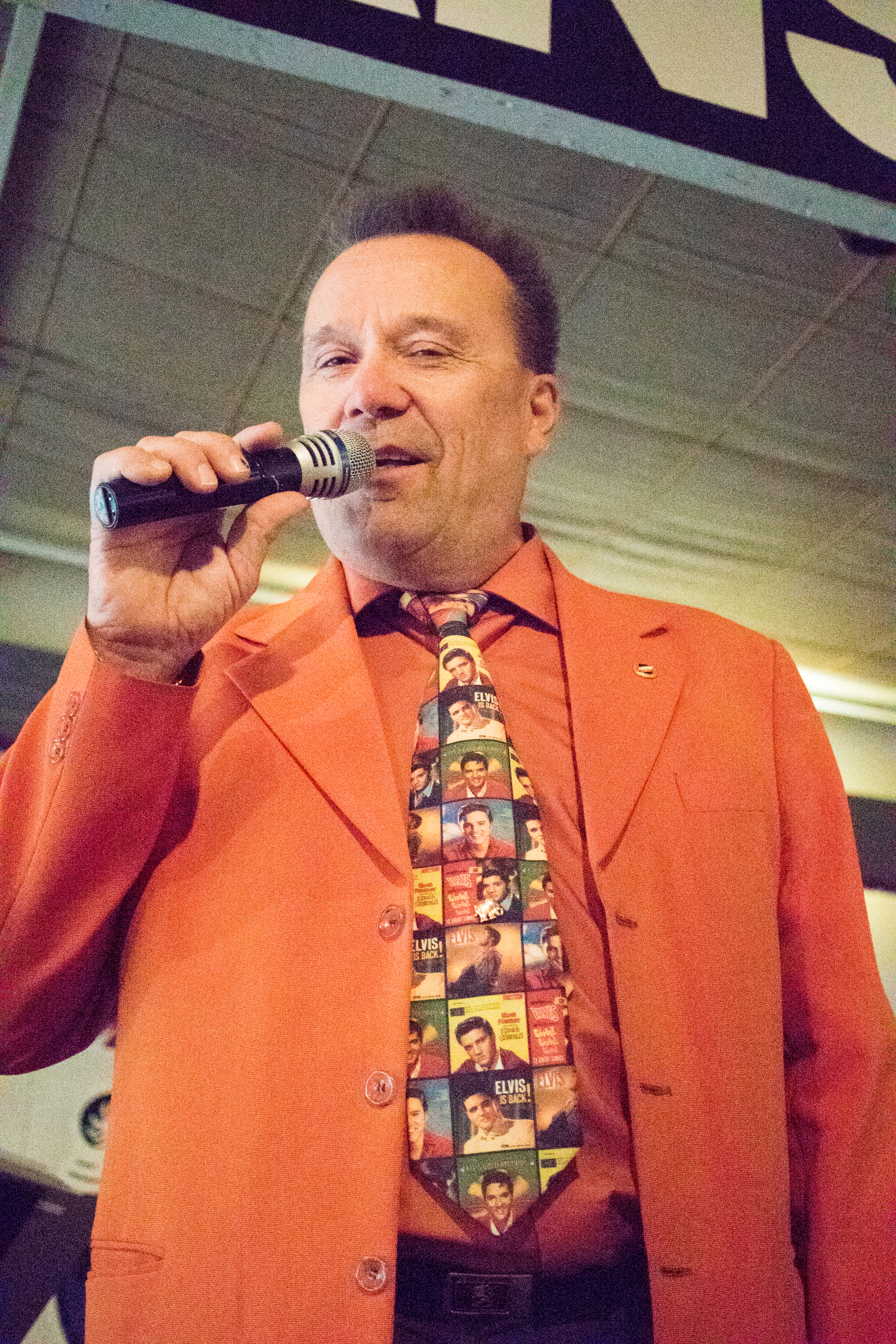 Jaska Mäkynen, suomalainen laulaja